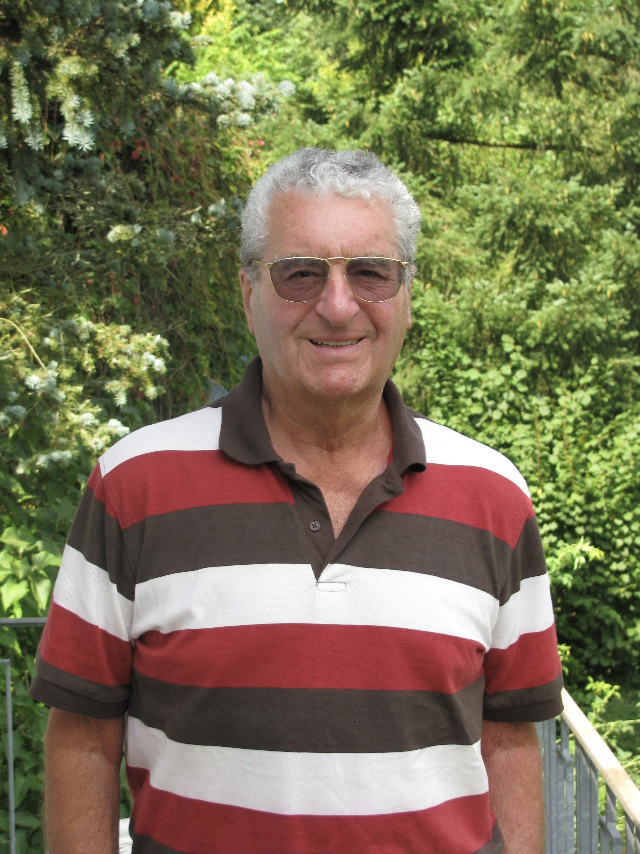 Werner auf dem Balkon in seinem Haus